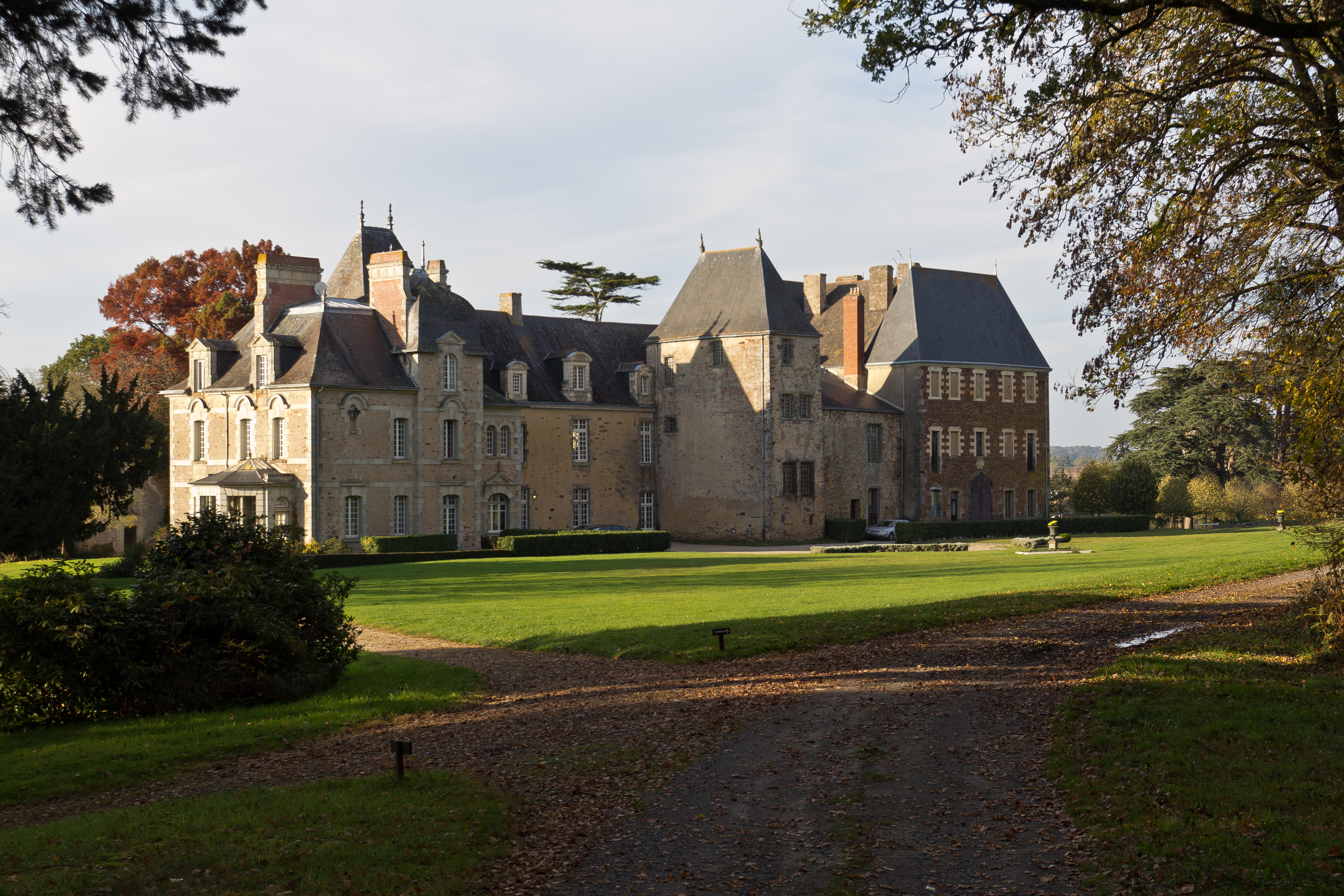 Façade est du château de Pordor.